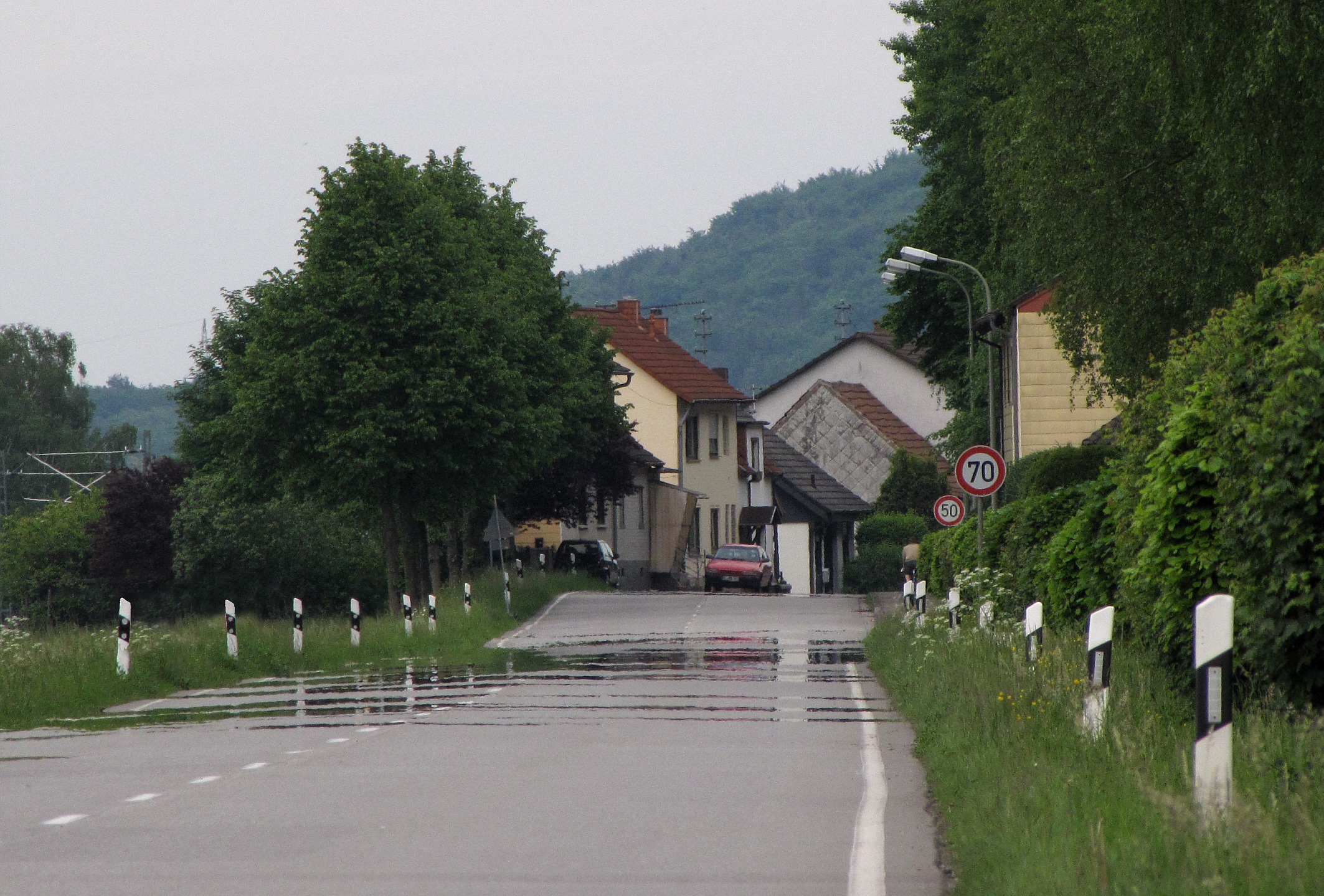 Luftspiegelung auf einer Straße